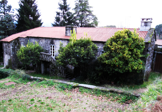 Pazo de Barreiro, en Vilar (Crecente)